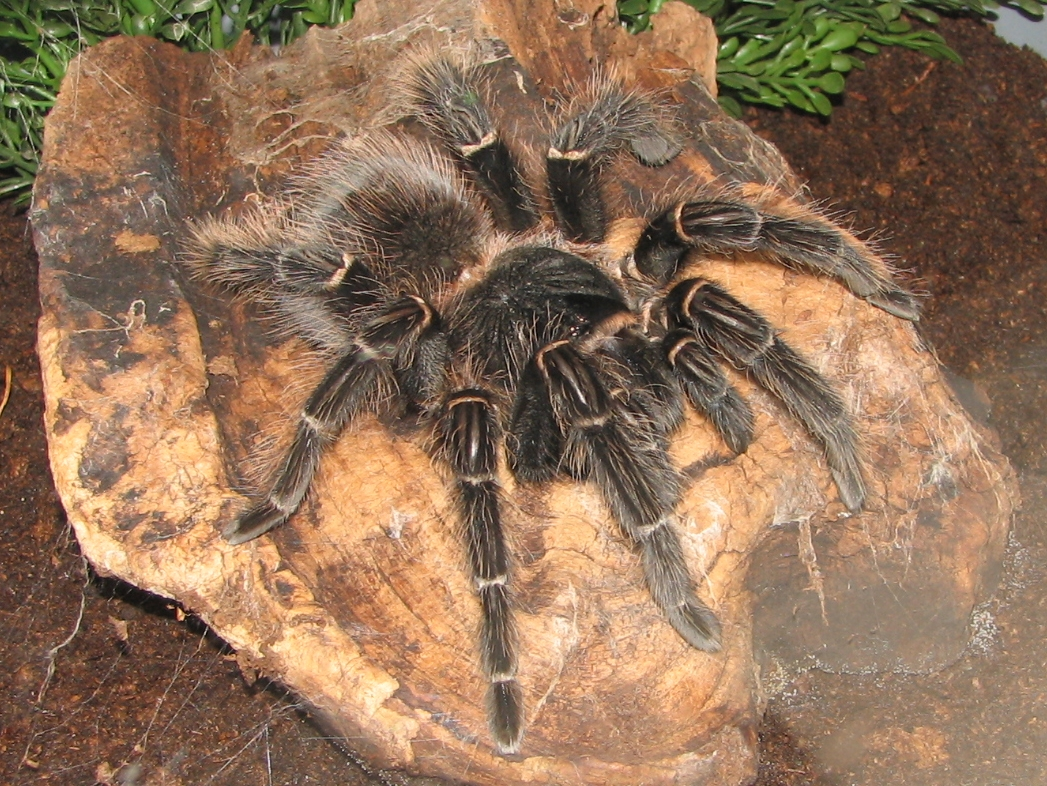 Brazilian Salmon Pink Birdeater (Lasiodora parahybana)